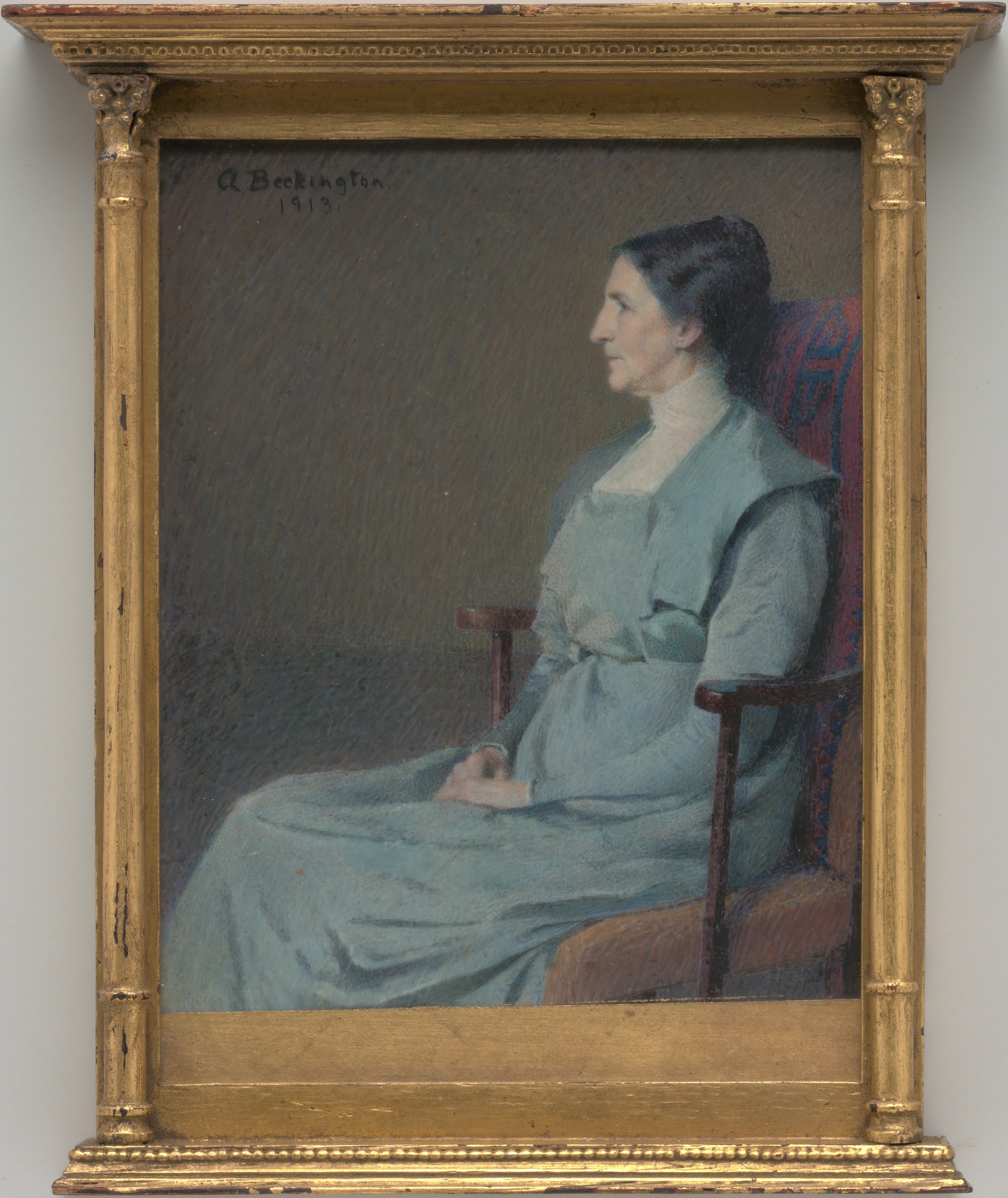 Painting, miniature; Paintings